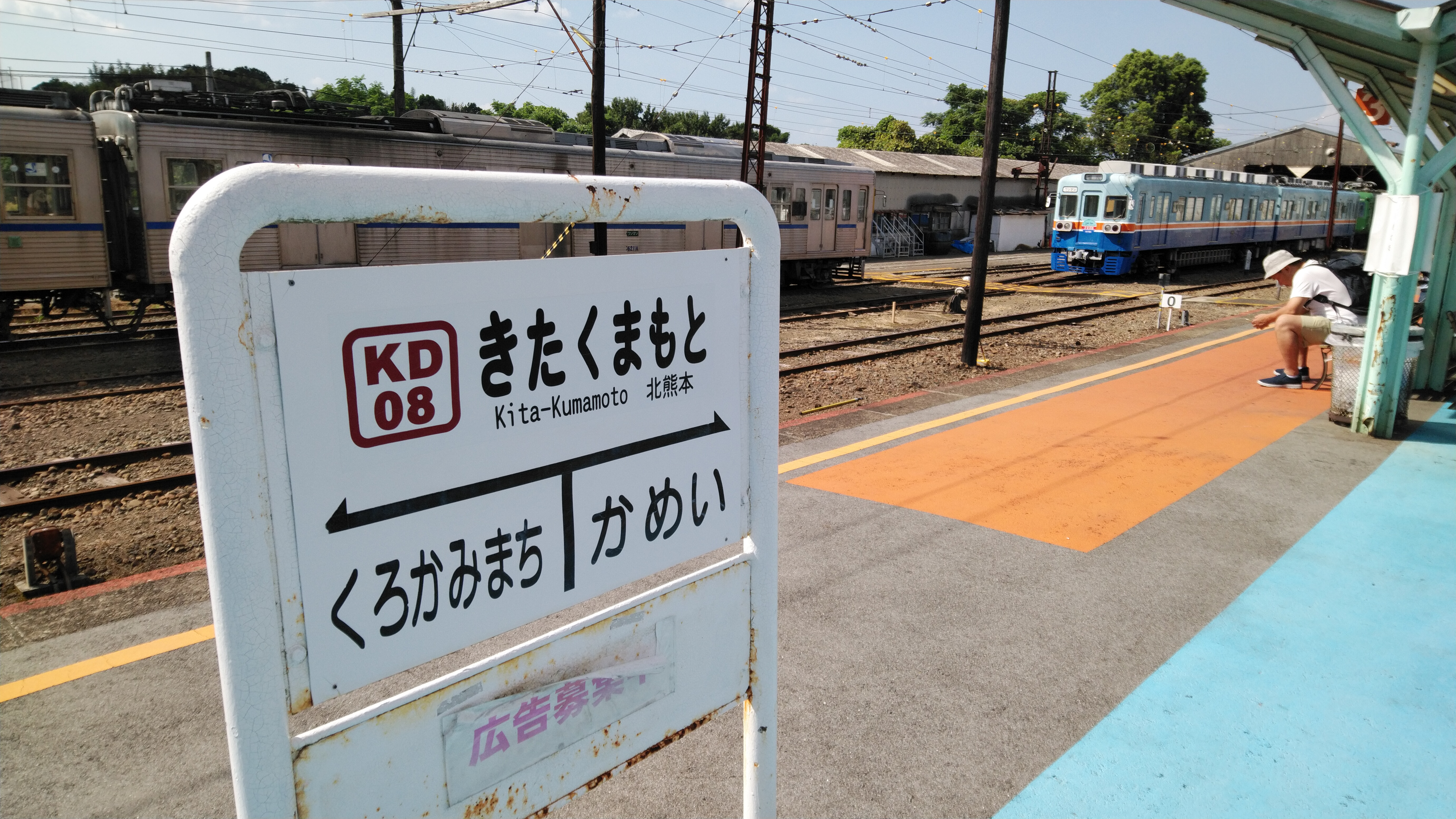 北熊本駅構内の駅名標と熊本電鉄200形電車